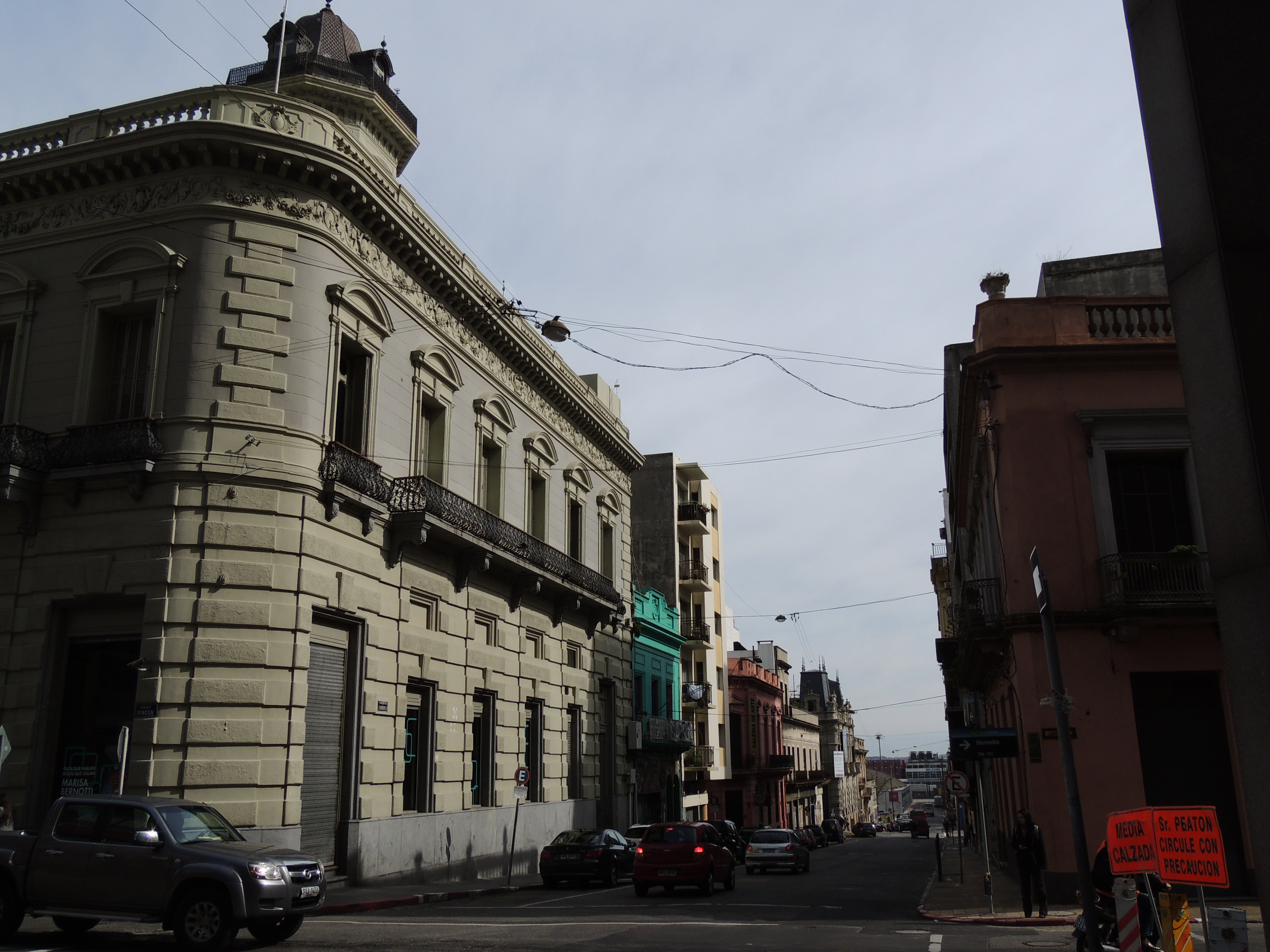 Edificio del Ministerio de Industria y Energía - Palacio Correa. Ubicada en el departamento de Montevideo